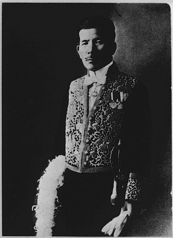 Portrait of Saito Takao (斎藤隆夫, 1870 – 1949)